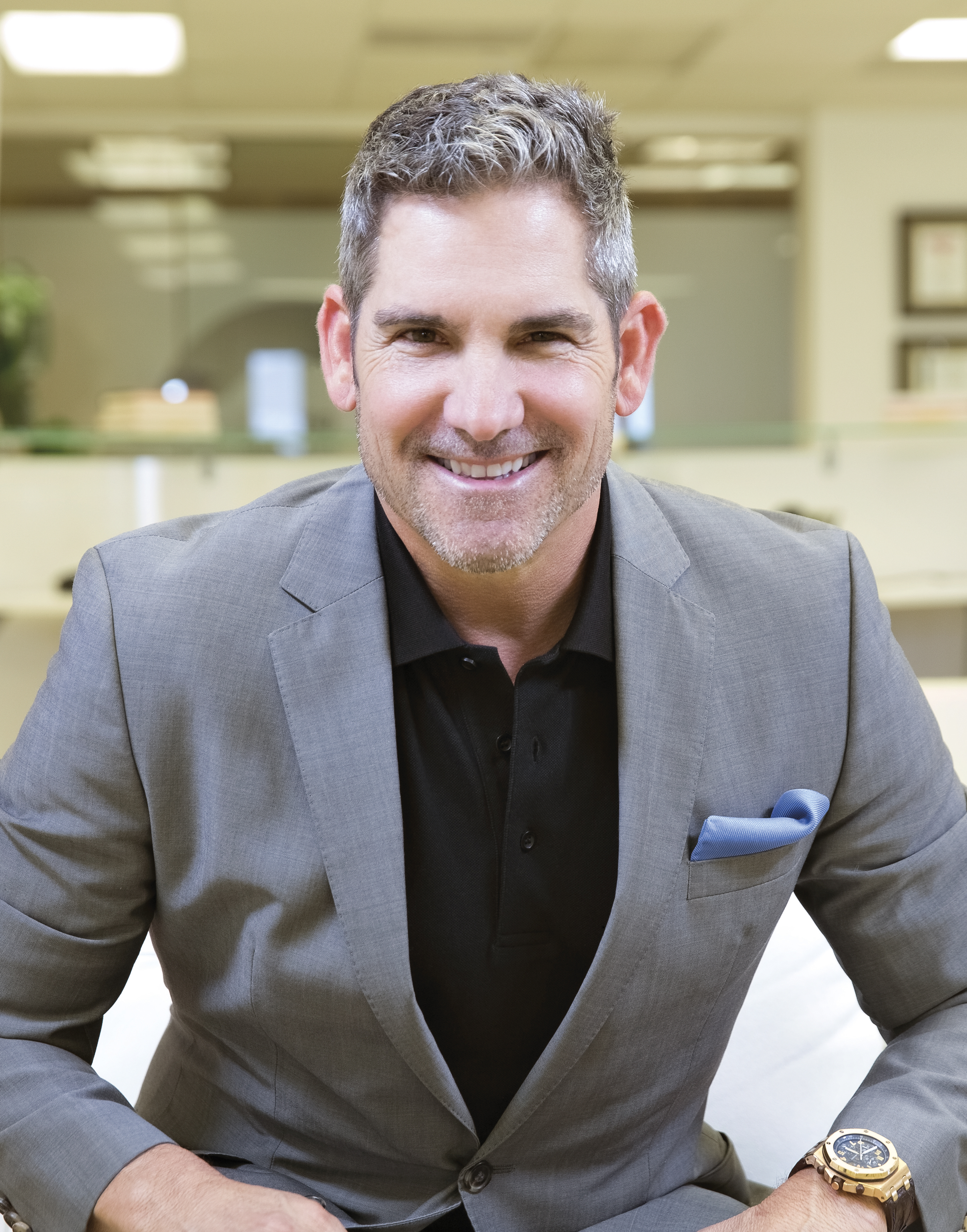 родился 21 марта 1958 года